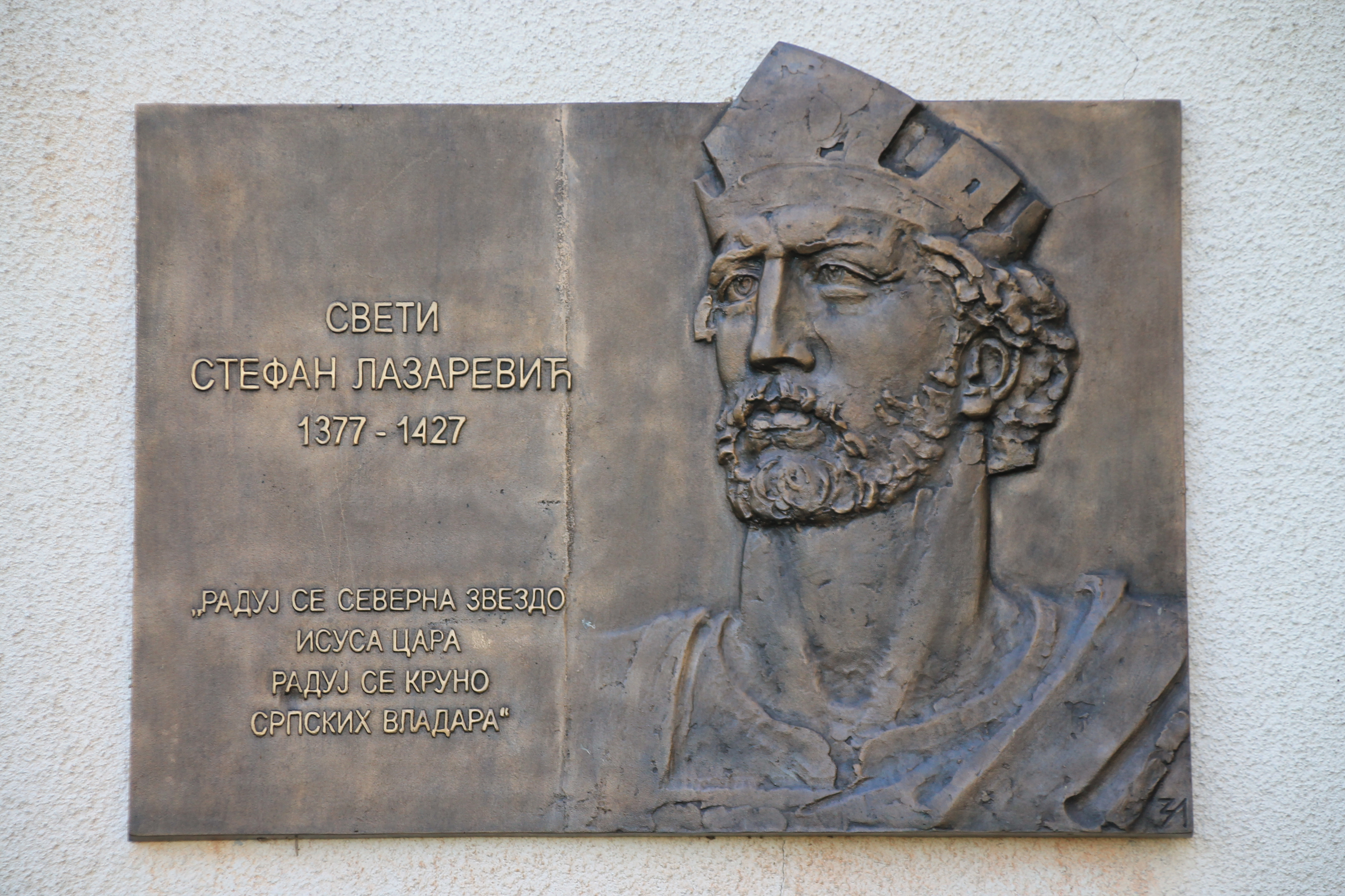 Crkva Sv. Ilije (Markovac)